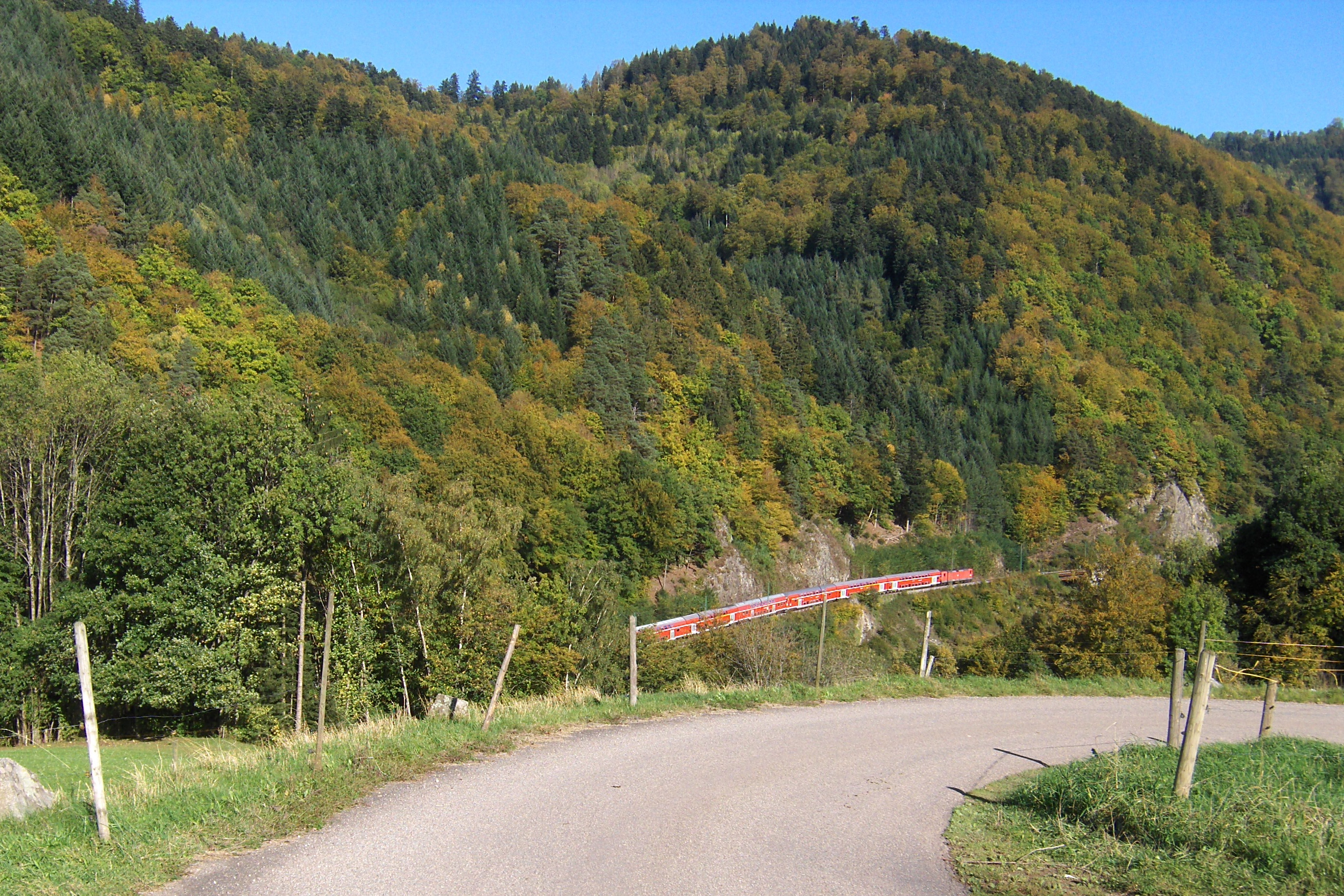 Zug von DB Regio mit 6 Doppelstockwagen und 2 Loks der Baureihe 143 auf der Fahrt ins Höllental oberhalb von Falkensteig.